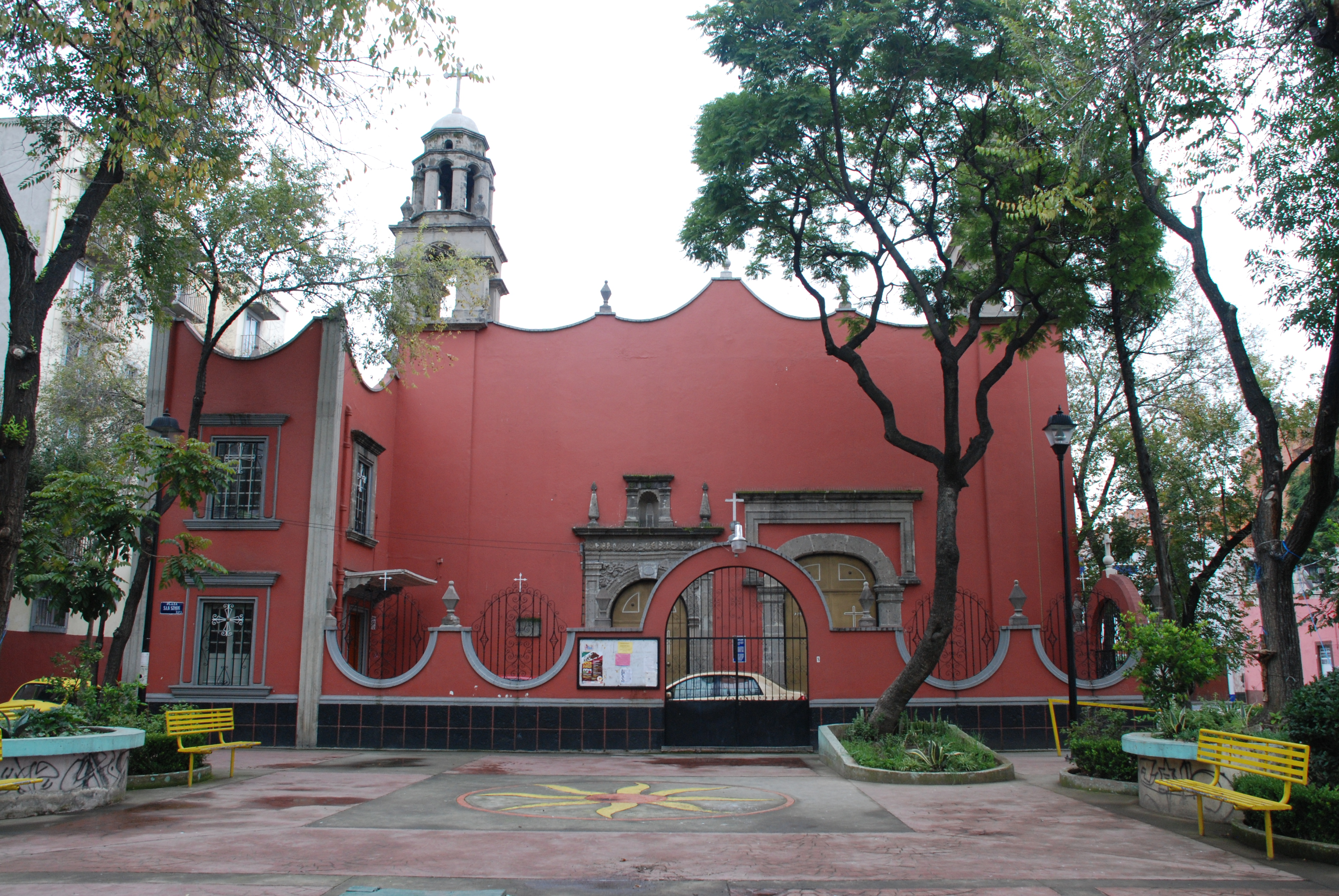 Plaza San Simón Tolnáhuac